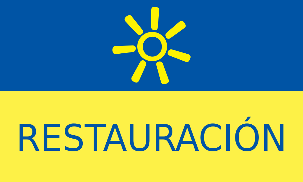 Bandera del partido